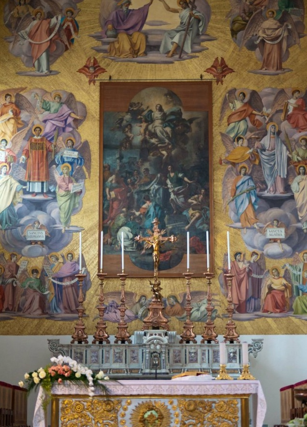 Il presbiterio della Cattedrale di Capua.